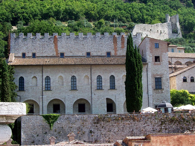 Gubbio - Palazzo Ducale